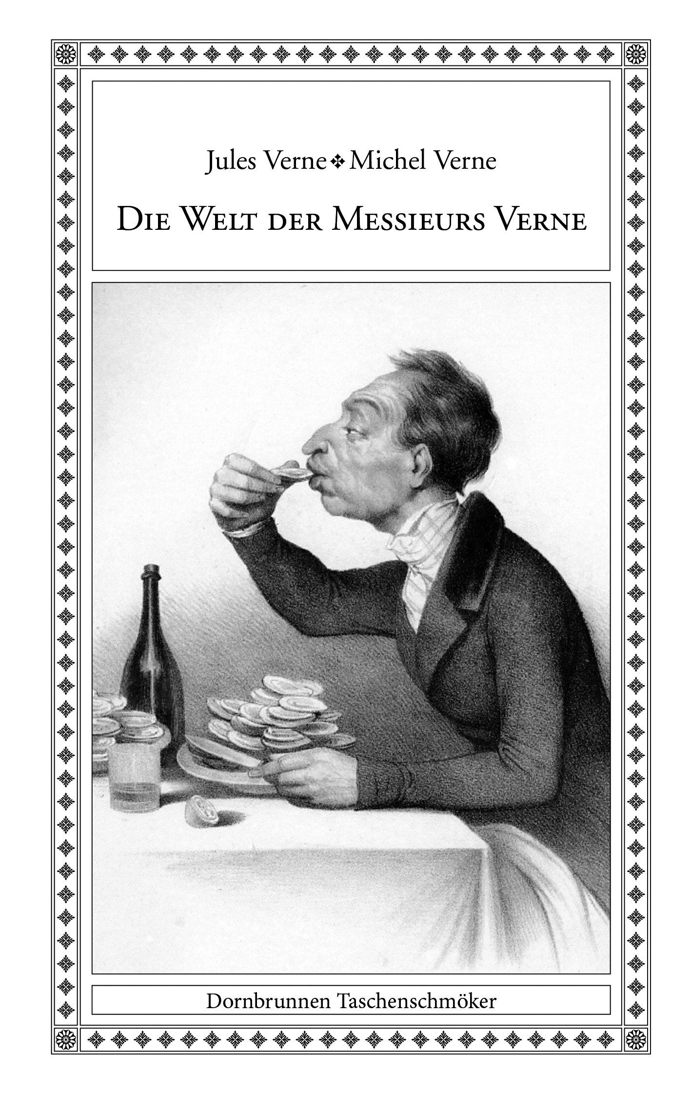 Titelbild des Sammelbandes "Die Welt der Messieurs Verne", Edition Dornbrunnen 2018